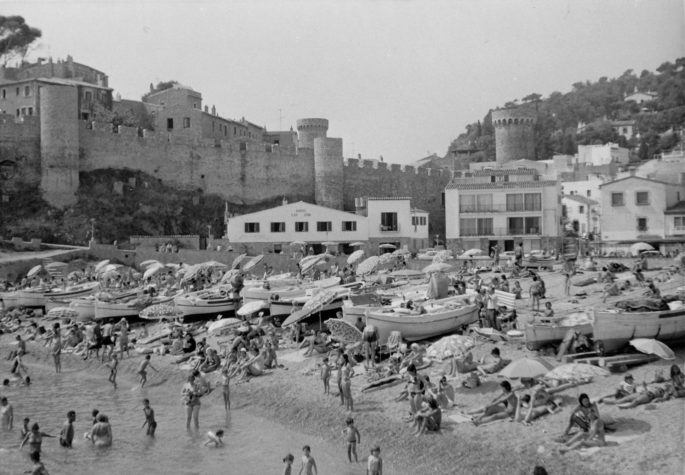 Platja Gran (Tossa de Mar) This is a a photo of a beach in Catalonia, Spain, with id: PL-CT-17003-332